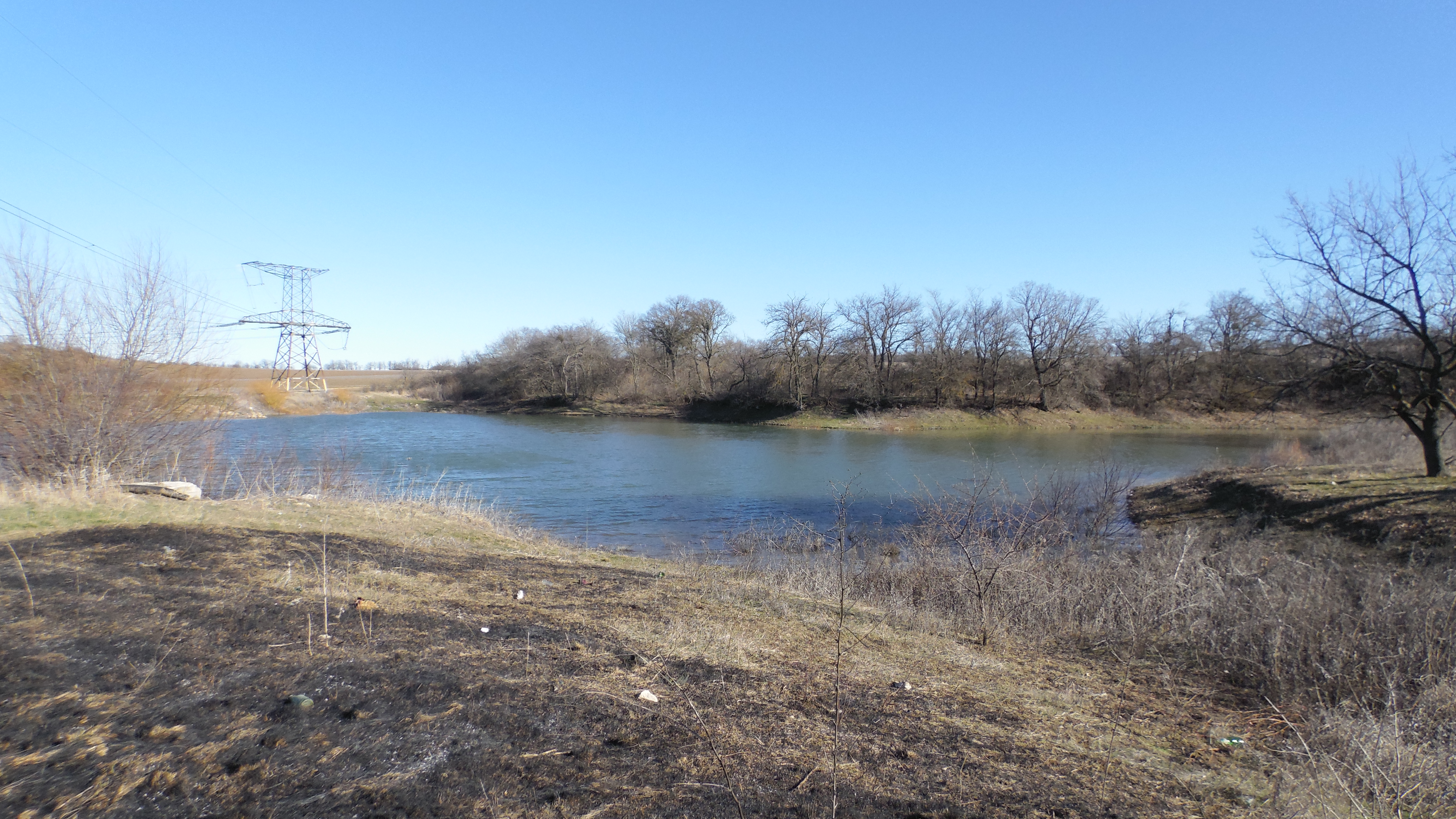 Пруд в верховье ручья Монтанай, Крым.